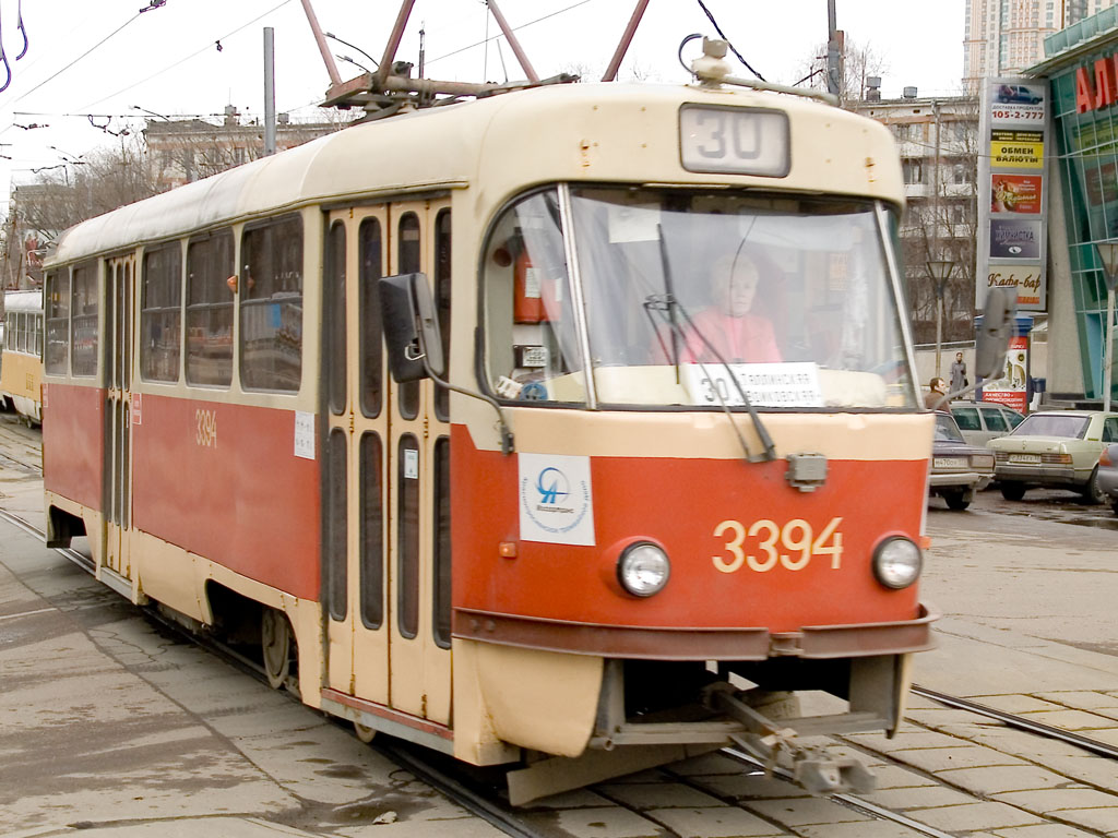 Трамвай модели Т3 № 3394 на улицах.